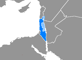 Idioma hebreo